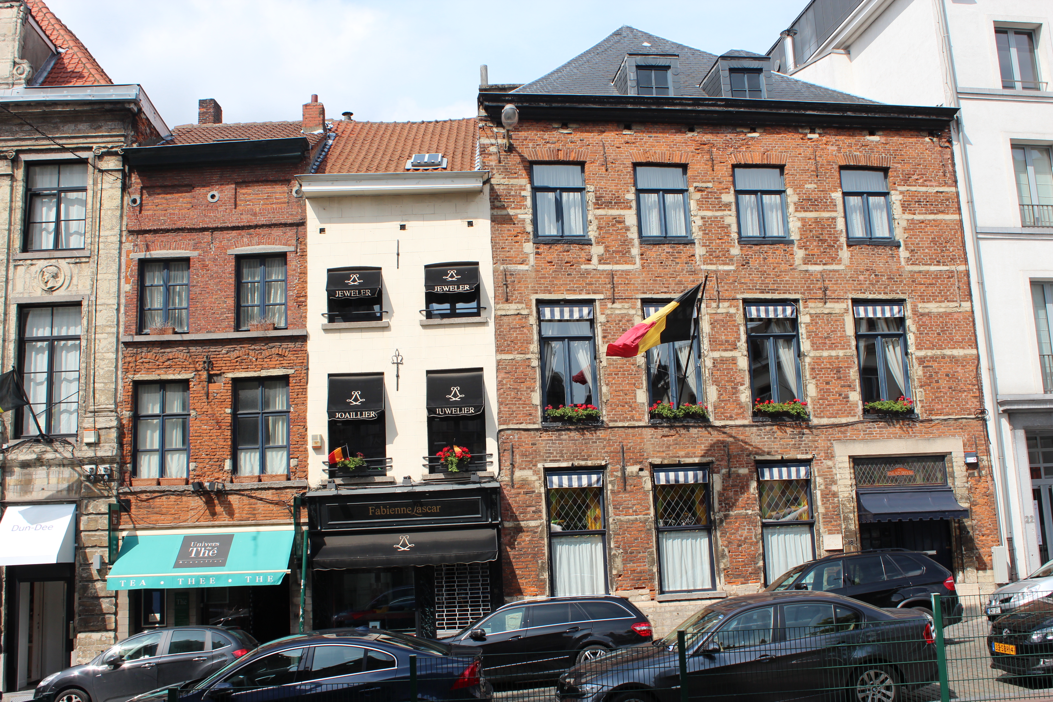 Rue Bodenbroek 14, 16, 18-20 à Bruxelles: Maisons traditionnelles, Anc. Rég.